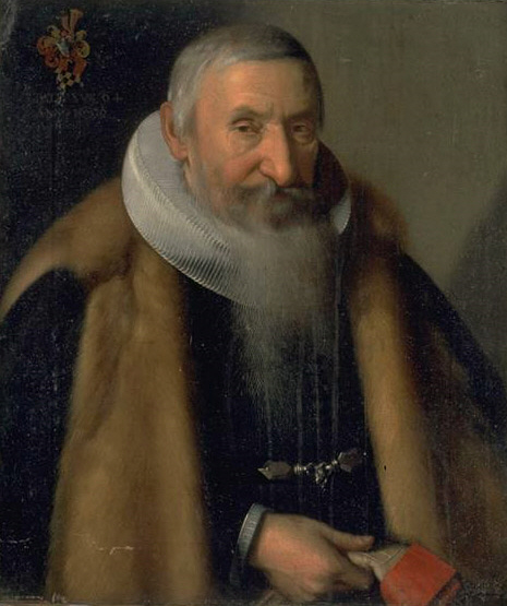 Herrenporträt Johann Heinrich Rahn (1593-1669), Zürich. Öl auf Leinwand; 60.5 cm x 52.5 cm Schweizerisches Landesmuseum, Zürich